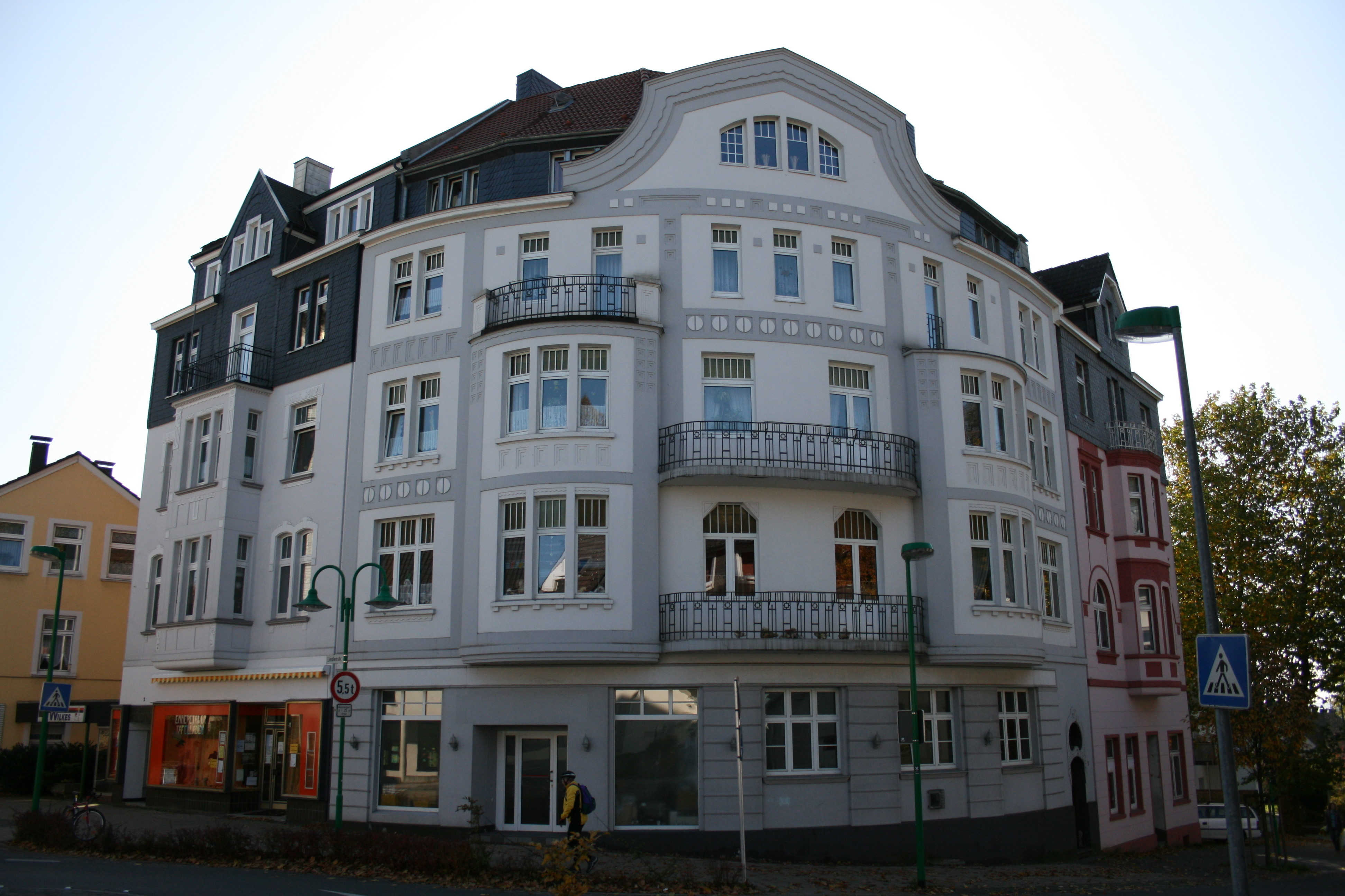 Milsper Straße in Ennepetal-Voerde